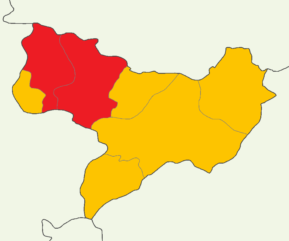 Amasya'da 2014 Türkiye cumhurbaşkanlığı seçimi sonuçları